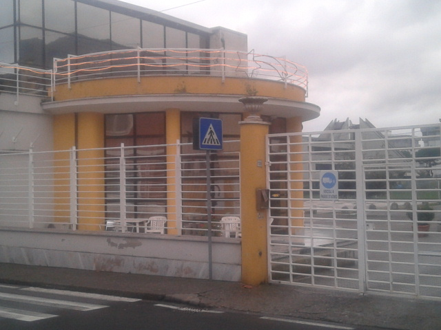 Casa del Balilla (Massa), vista da via Marina Vecchia